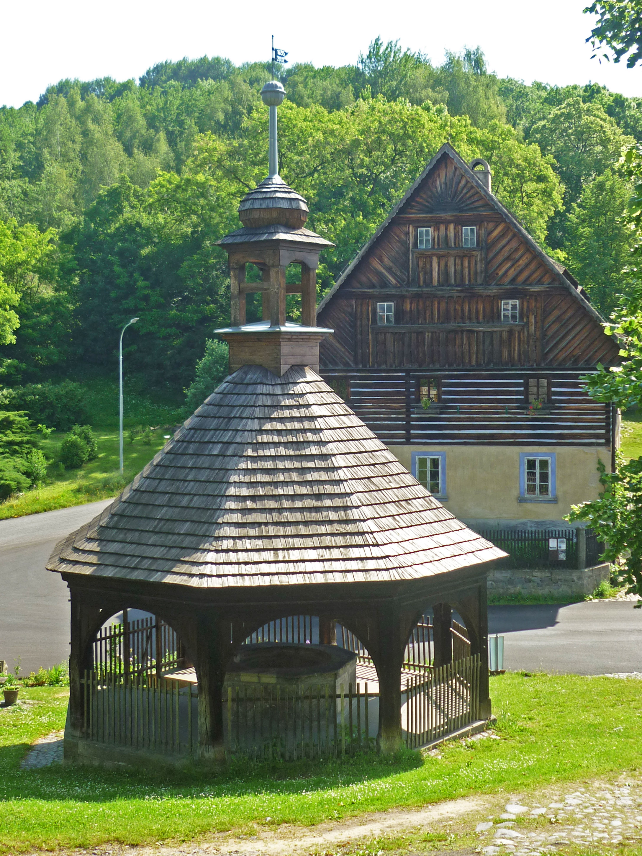 Brunnen auf dem Dorfplatz in Saubernitz (Zubrnice), Okres Okres Ústí nad Labem